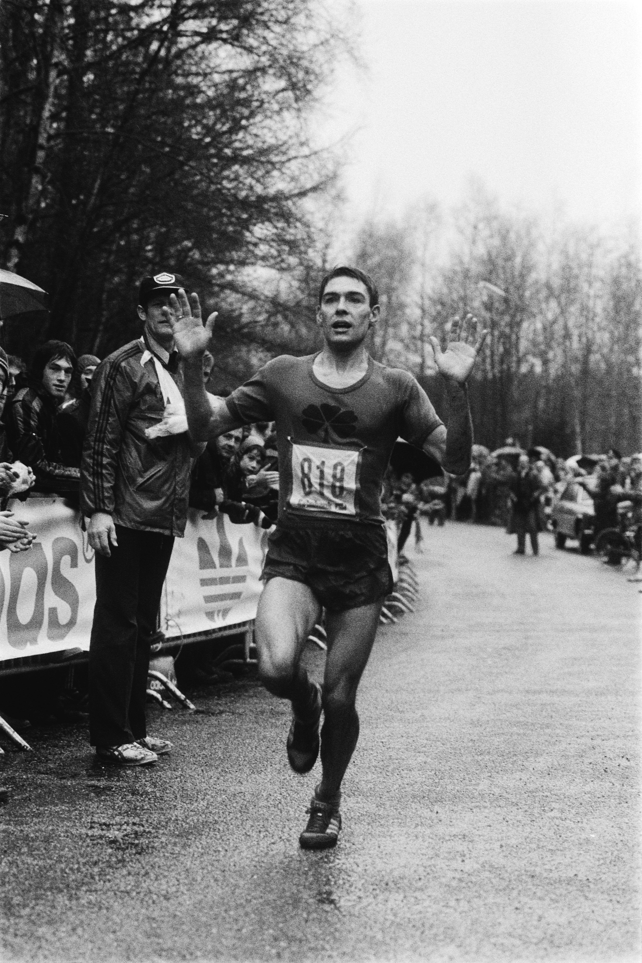 Collectie / Archief : Fotocollectie Anefo Reportage / Serie : [ onbekend ] Beschrijving : Midwinter marathon in Apeldoorn; Cor Vriend finisht Datum : 2 februari 1980 Trefwoorden : MARATHONS Persoonsnaam : Cor Vriend Fotograaf : Suyk, Koen / Anefo Auteursrechthebbende : Nationaal Archief Materiaalsoort : Negatief (zwart/wit) Nummer archiefinventaris : bekijk toegang 2.24.01.05 Bestanddeelnummer : 930-6541